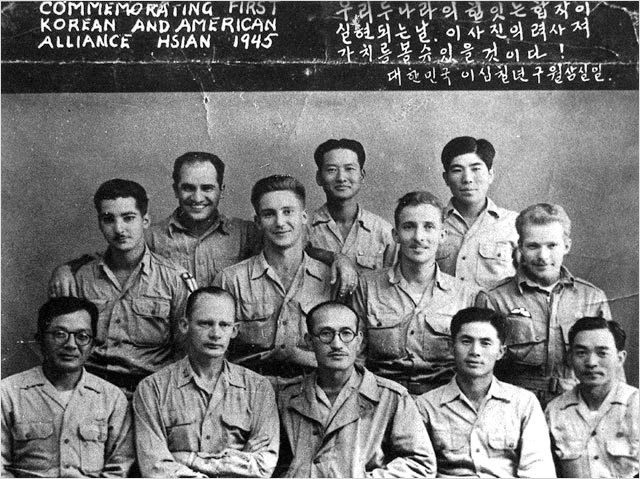 이범석과 광복군, 미 OSS 요원